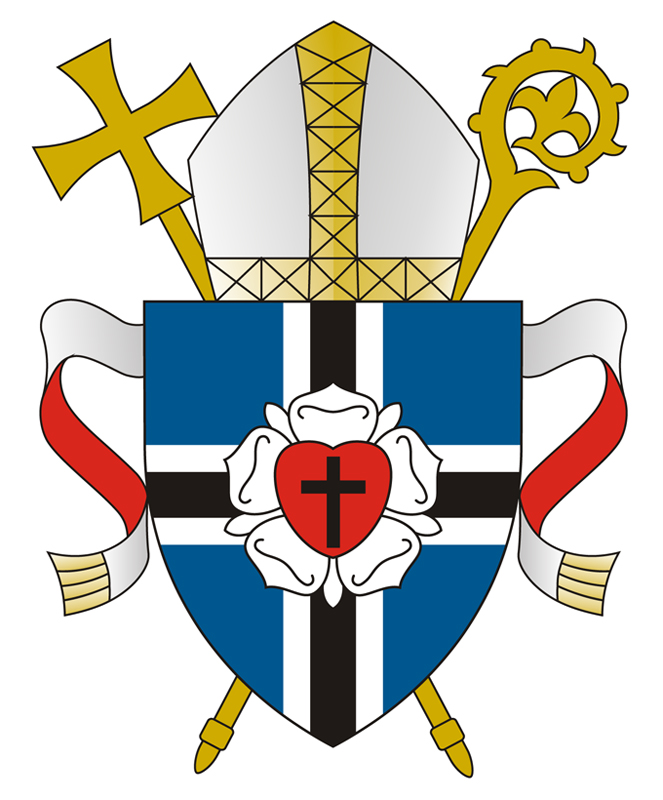 EELK peapiiskopi vapp ehk EELK suur vapp